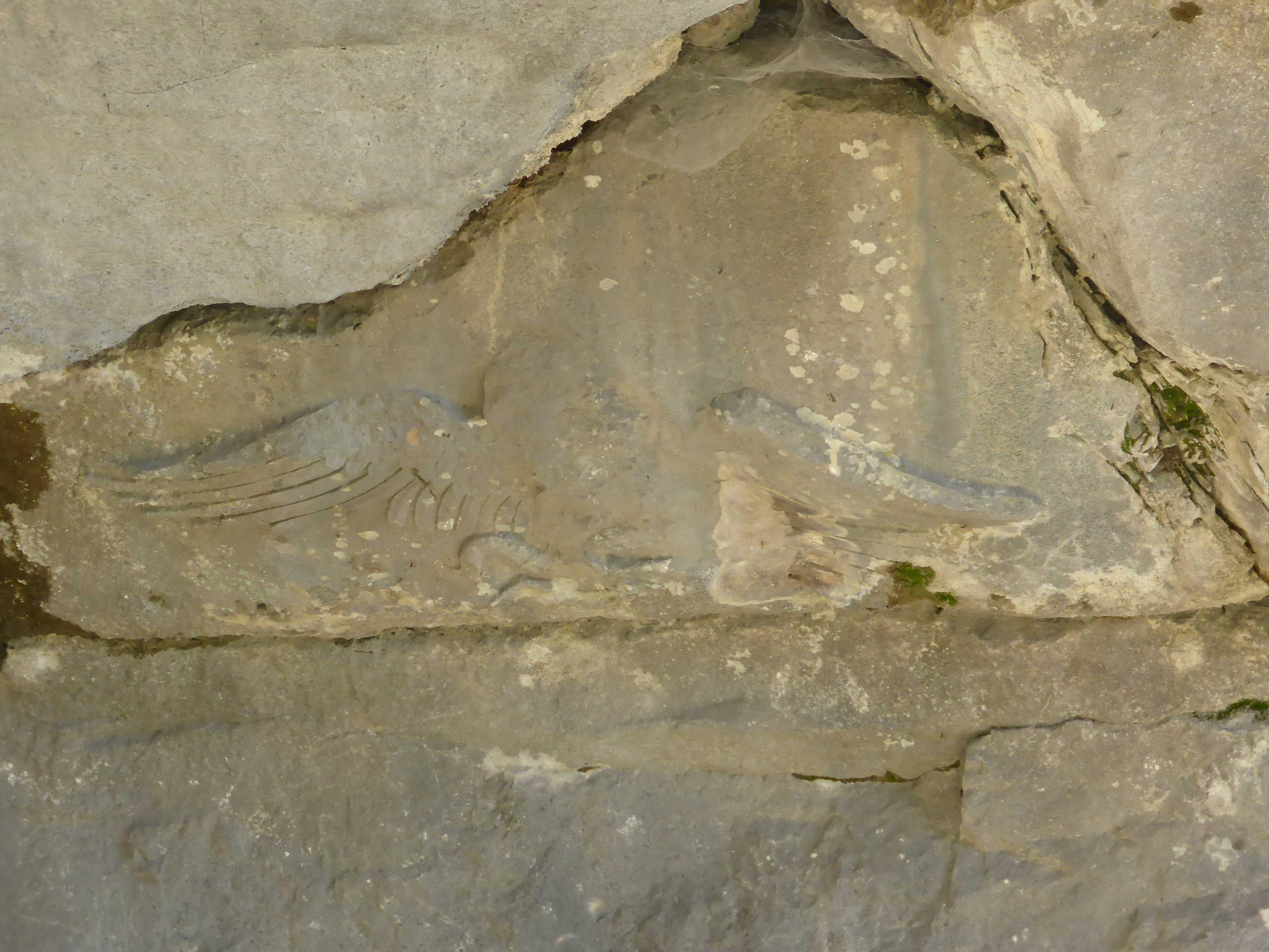 Alketasgrab, Termessos